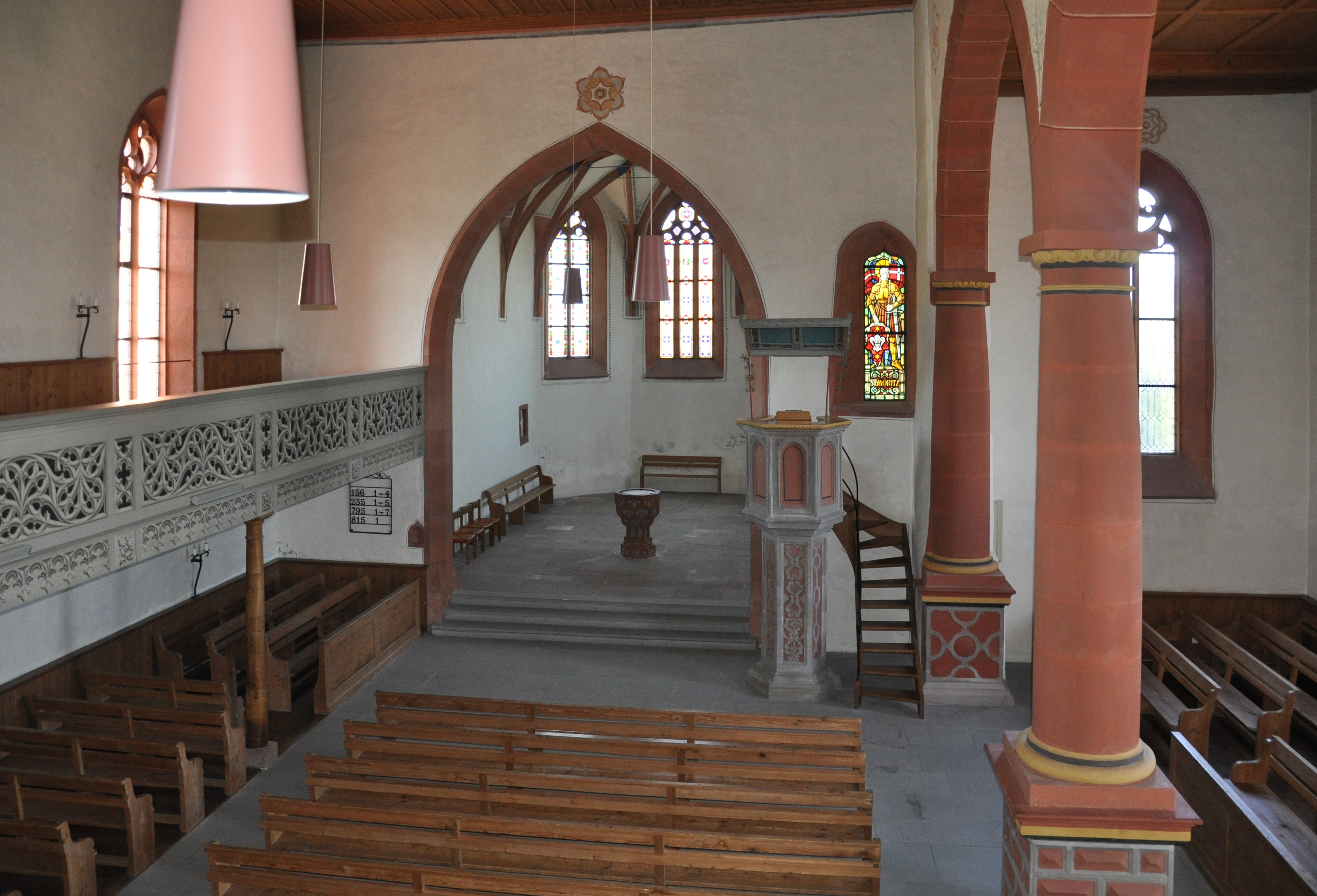 Hallau (Kanton Schaffhausen), Bergkirche St. Moritz Ansicht von der Empore